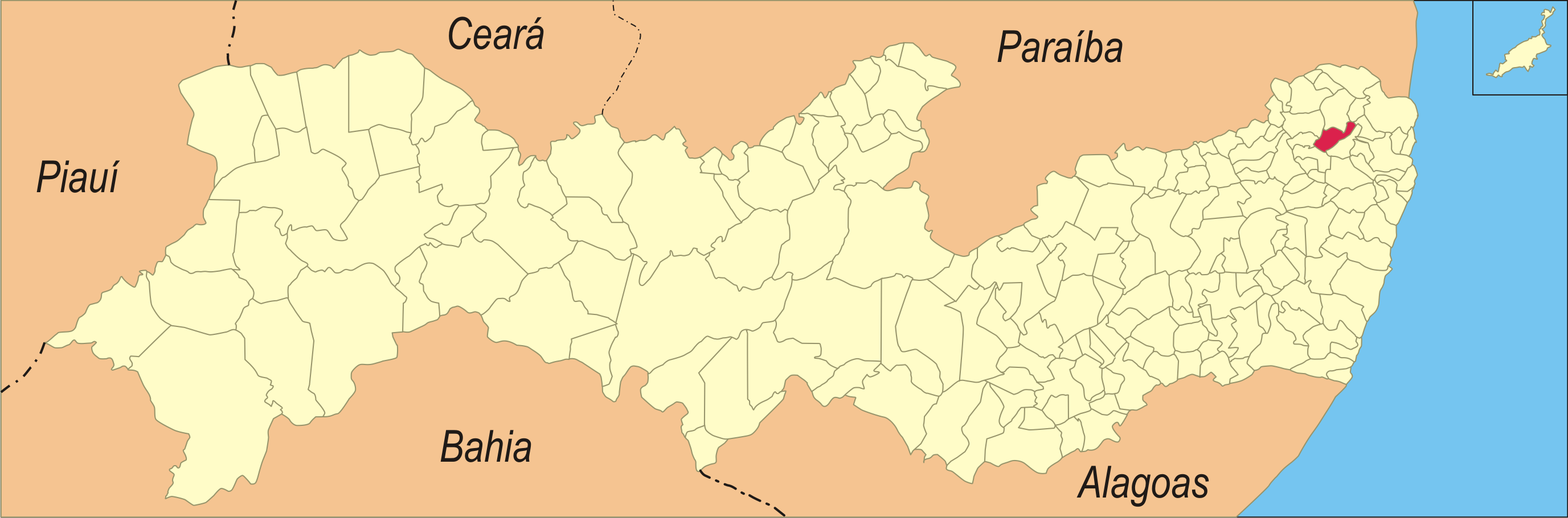 Localização da cidade em Pernambuco